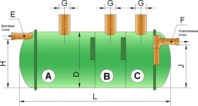 Септик - локальное очистное сооружение